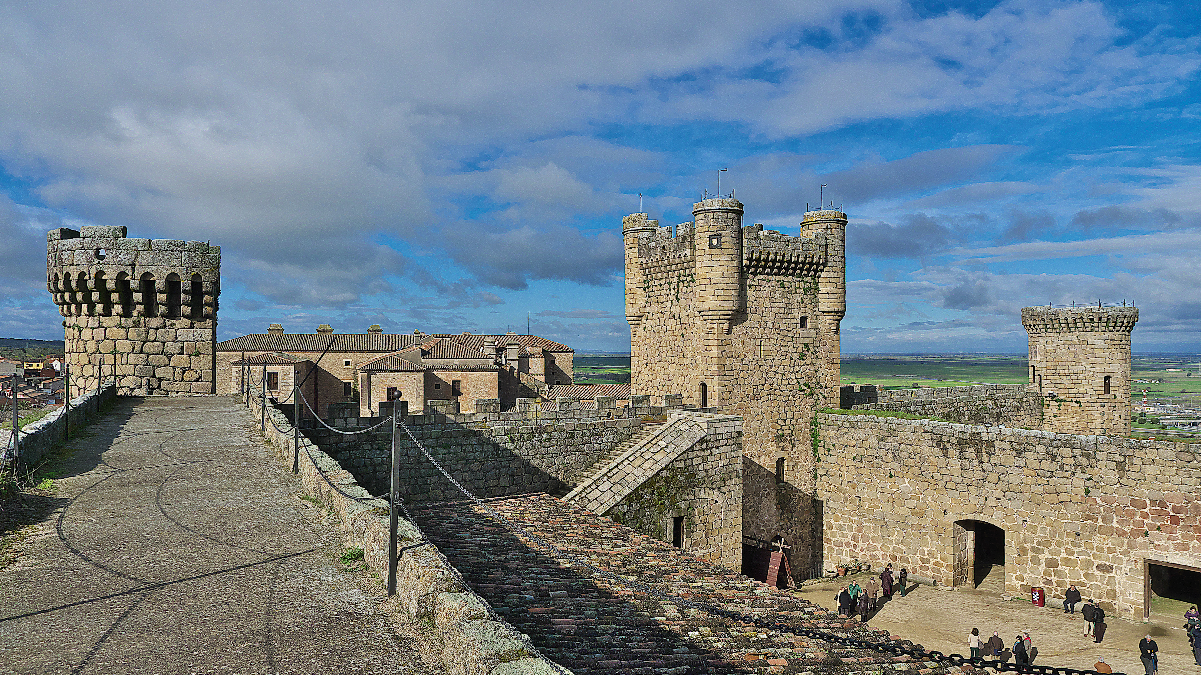 García Álvarez de Toledo (m. 1370) recibe de Enrique II el antiguo castillo. Existen restos de otro anterior.